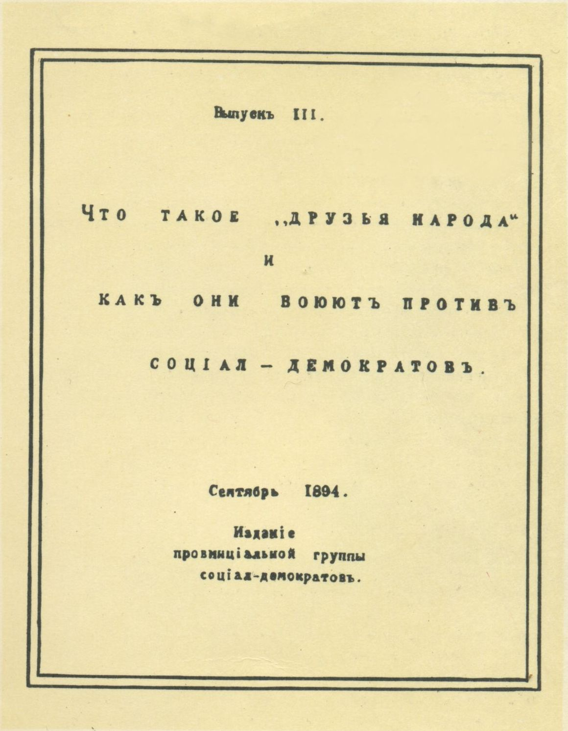 Обложка книги В. И. Ленина Что такое „друзья народа“ и как они воюют против социал-демократов? (1894)